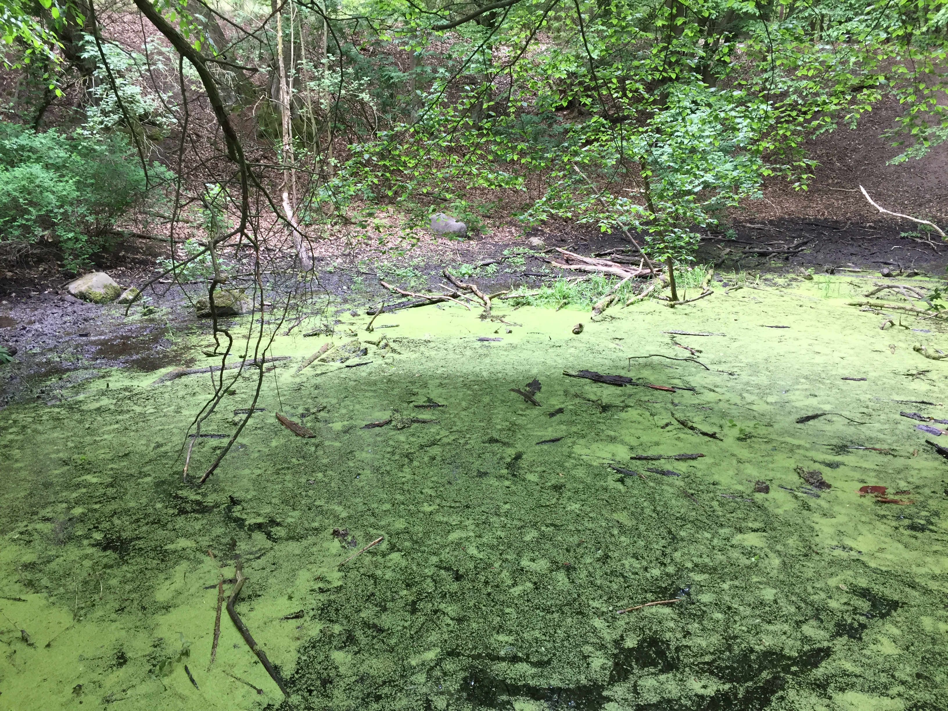 Quelle im Wald